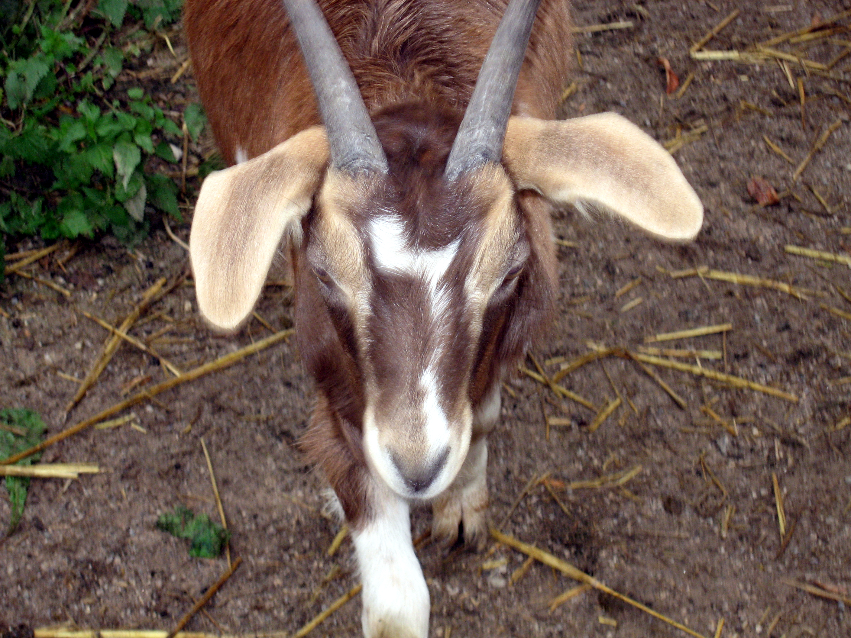 Dortmund, AWO-Projekt Schultenhof, Behindertenarbeit, ökologische Landwirtschaft, Kinderspielplatz, ökologische Ziegenhaltung